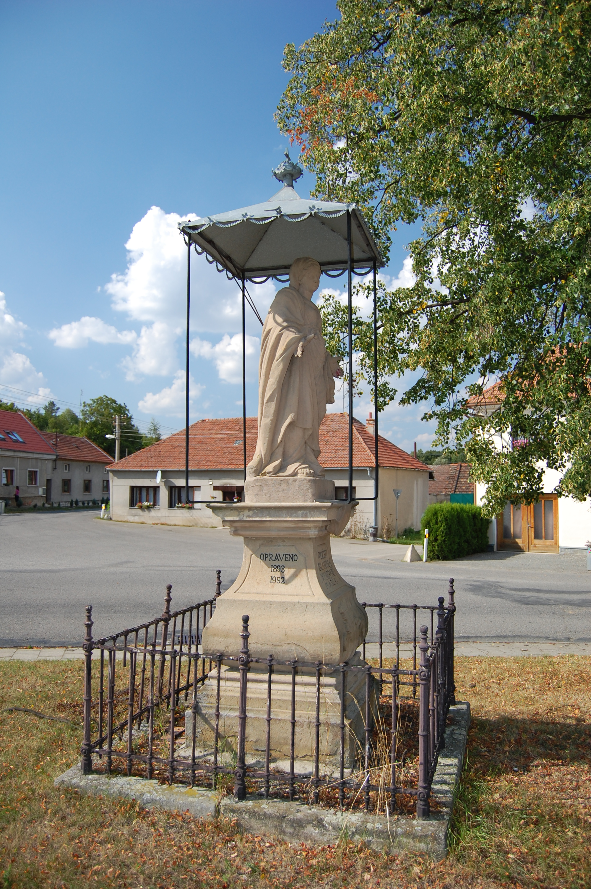 Socha na návsi, Žárovice, Plumlov, okres Prostějov